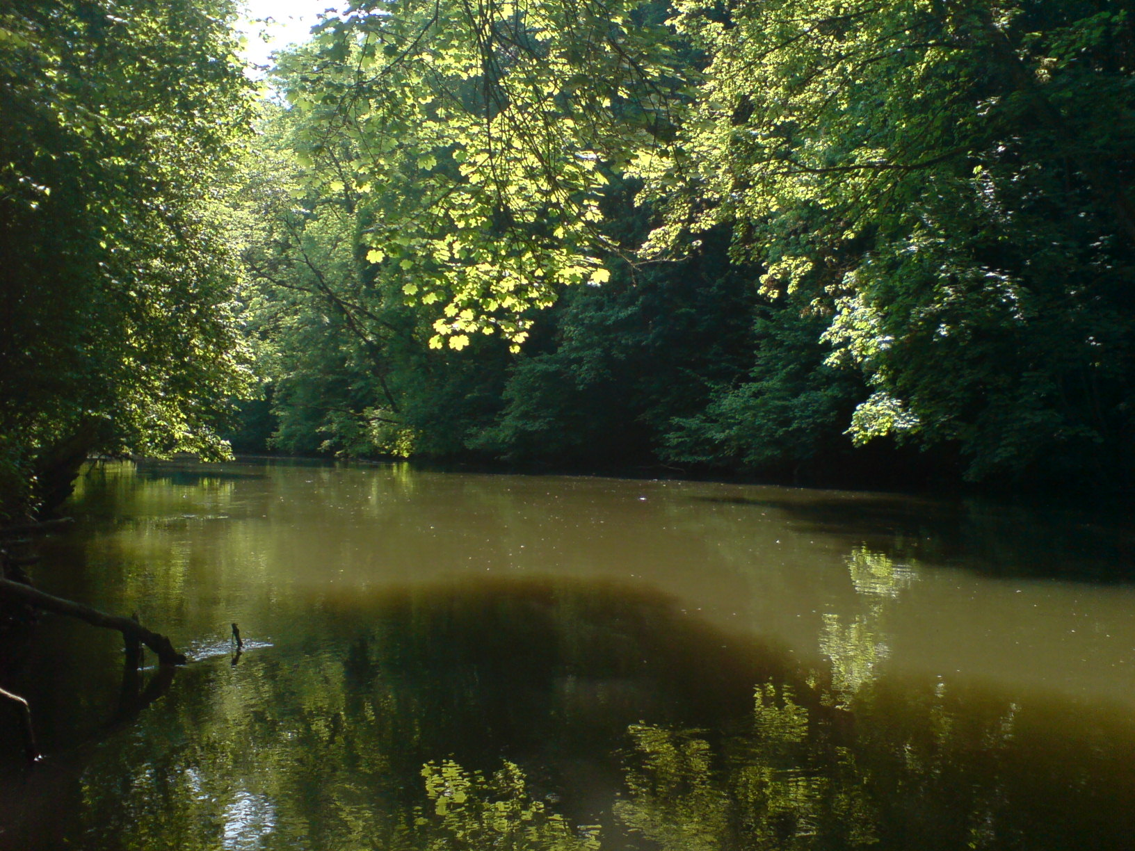 Die Enz in der großen Enzschleife zwischen Unterriexingen und Untermberg. Durchfluss zum Aufnahmezeitpunkt 15-17 m3/s.